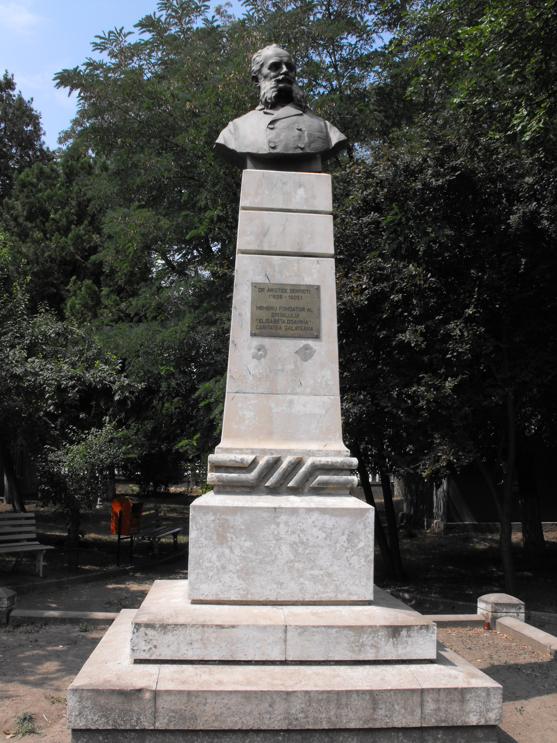 Bustul dr. Aristide Serfioti